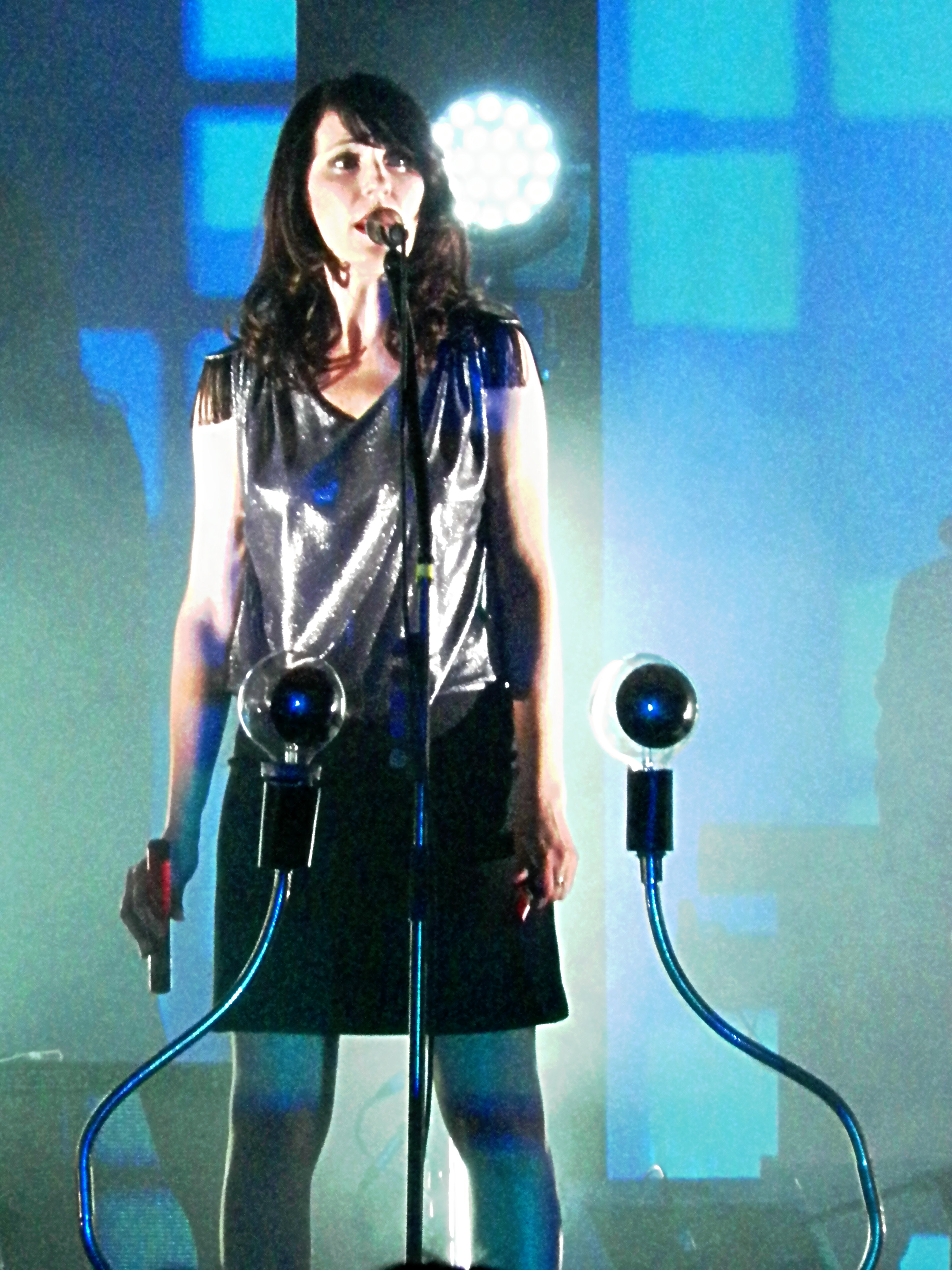 La Grande Sophie lors d'un concert en juin 2012.